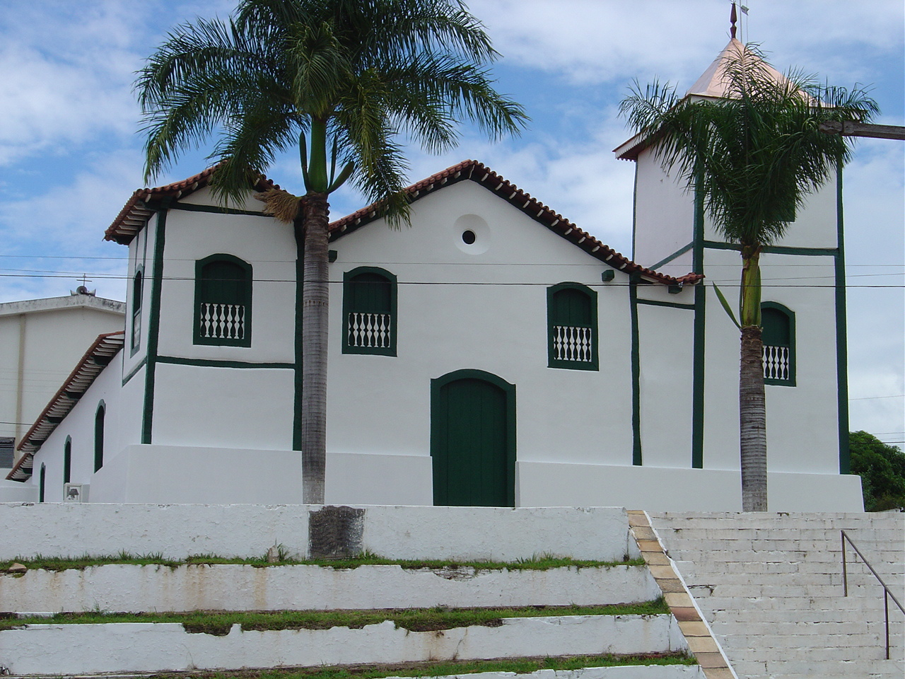 Igreja Matriz Nossa Senhora da Penha de França, Corumbá de Goiás.